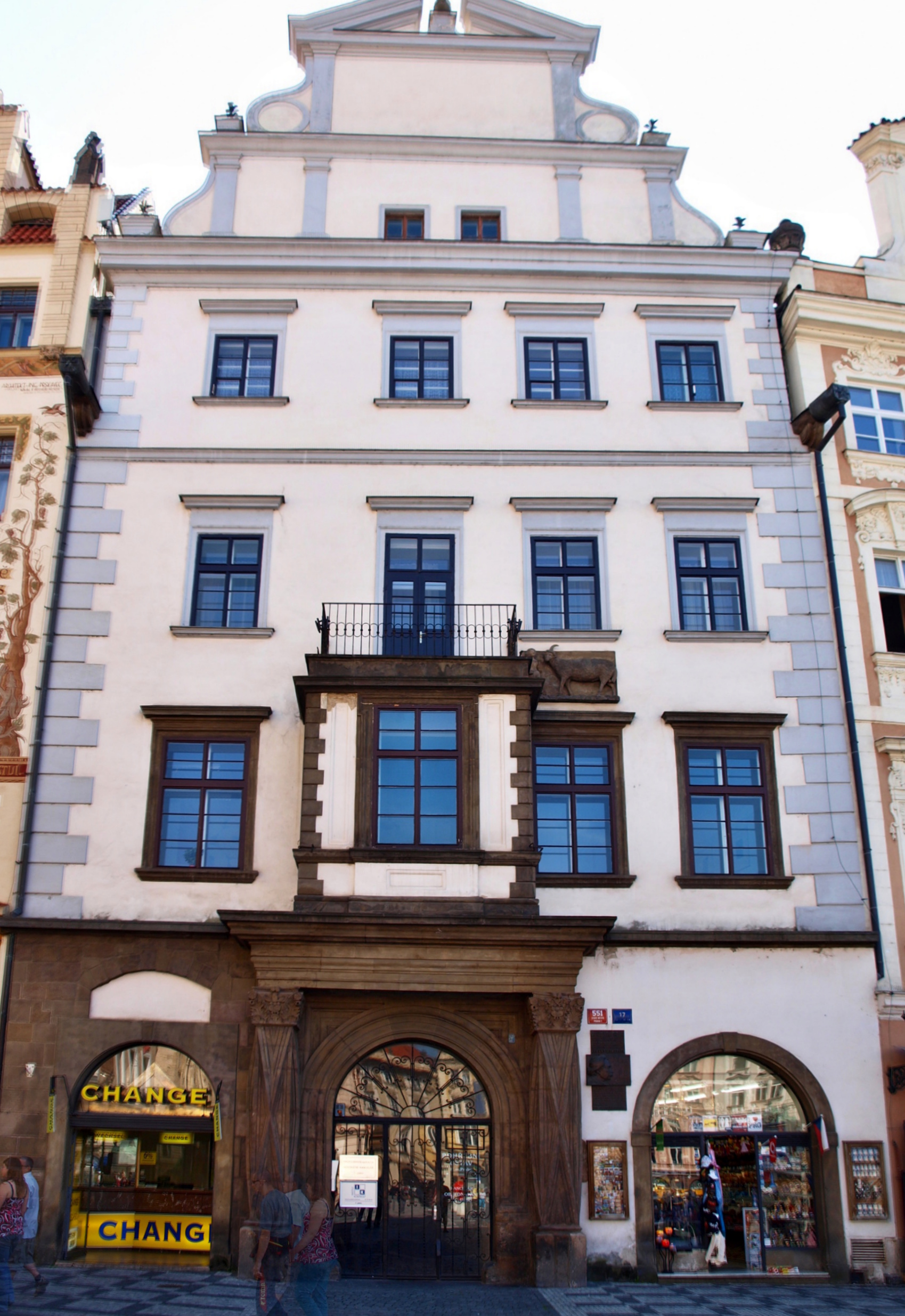 Staroměstské náměstí, Dům U bílého jednorožce, též U Kamenného beránka, salon Berty Fantové